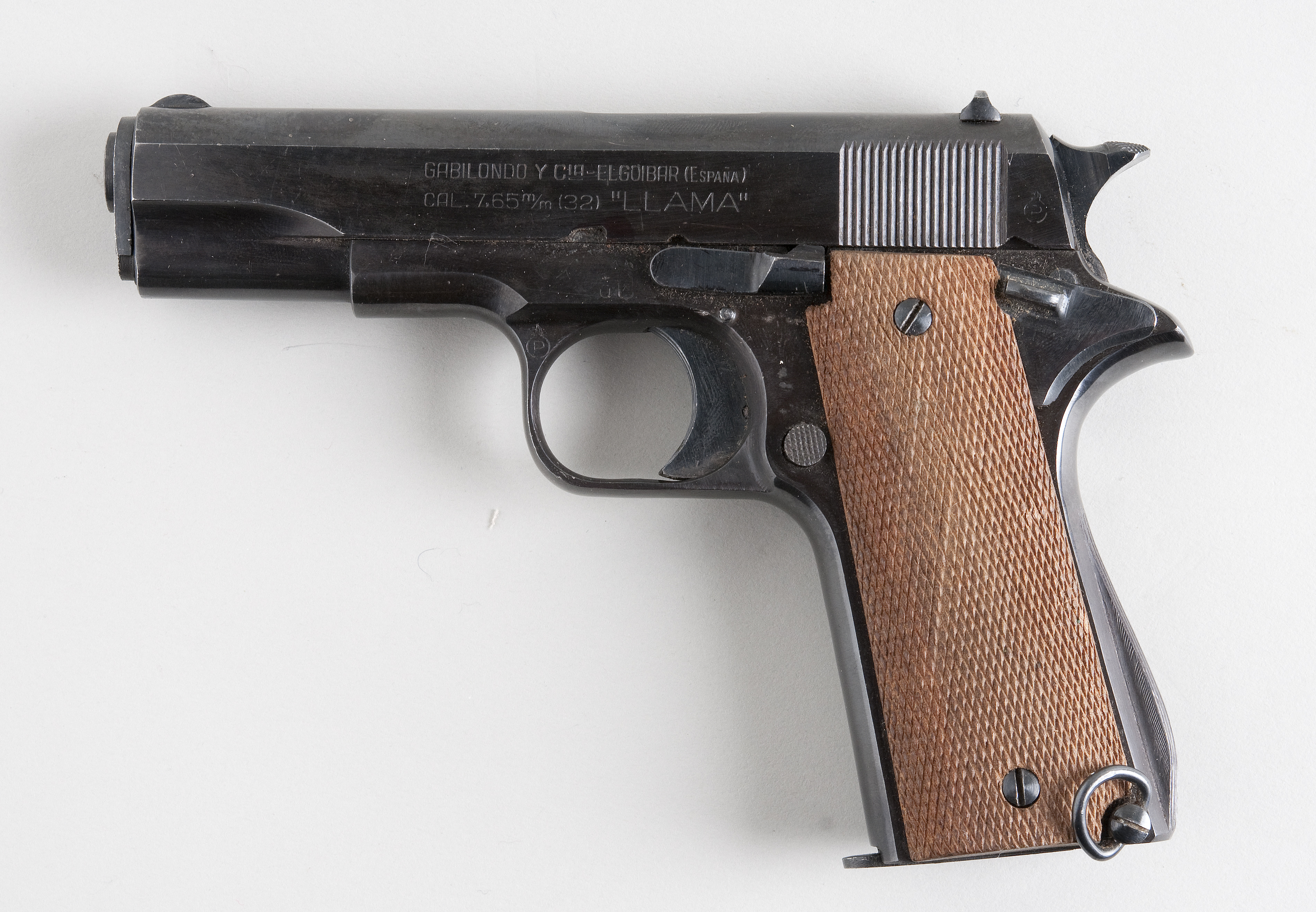 Llama 7,65 mm From flickr user handvapensamlingen - Pistols used in Norway.